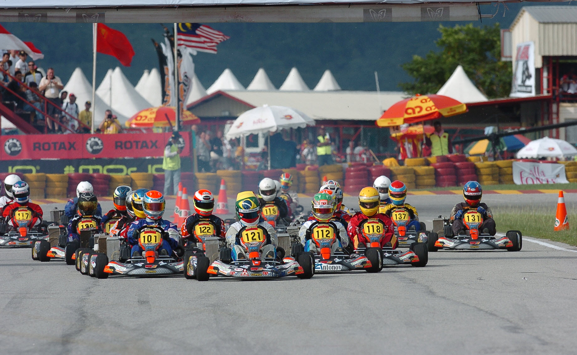 Rotax Max Grand Finals Starting Position